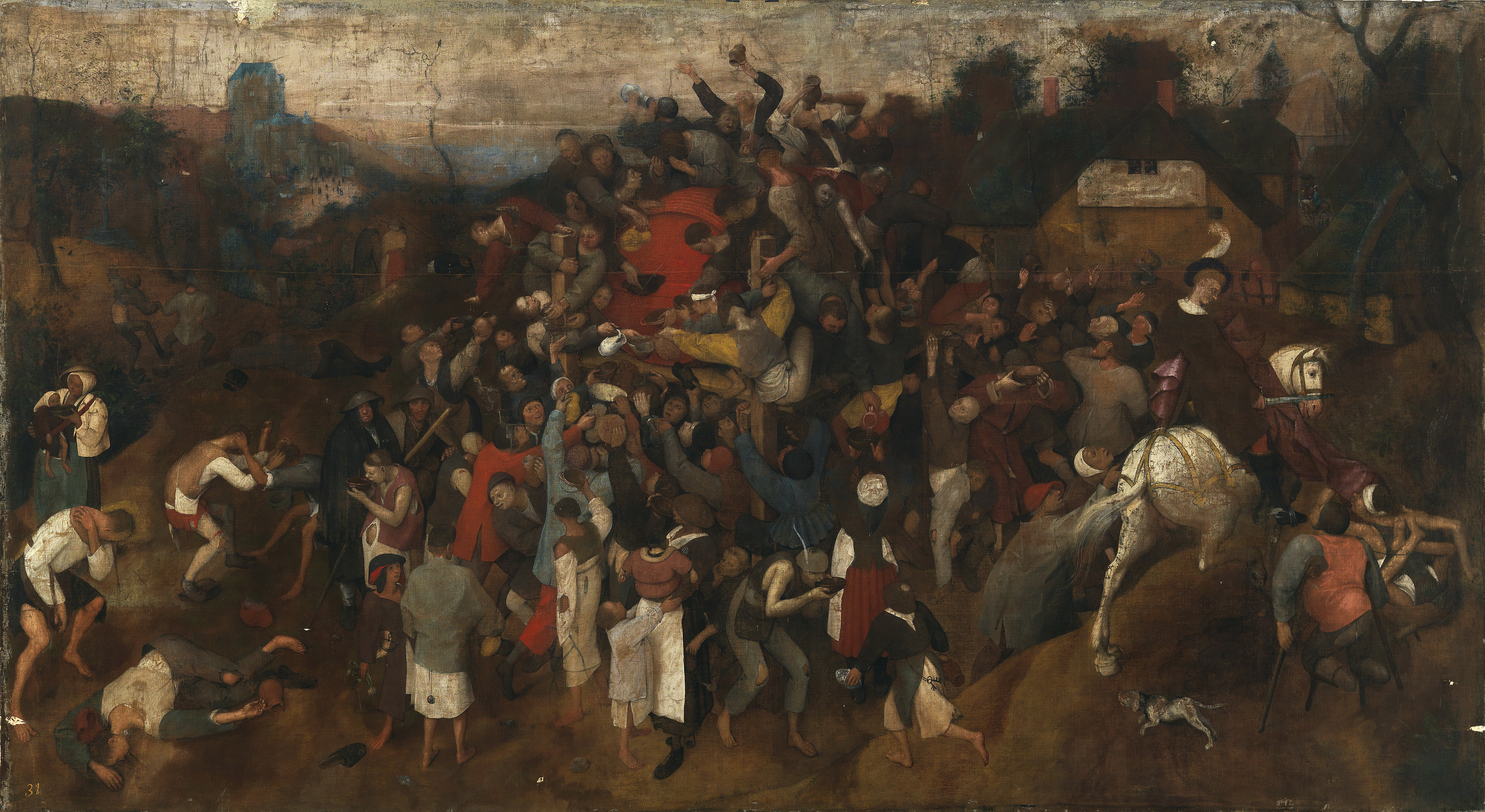 Die ganze Bevölkerung feiert den St.Martins-Tag traditionell mit einem Gansessen, aber hier fällt das Fest mit der Weinlese zusammen, wobei die Ausmaße des übermäßigen Konsums hier sichtbar werden. Der Maler stellt das Fest in zahlreichen Szenen bildlich dar und schmückt einzelne Episoden detailliert aus.